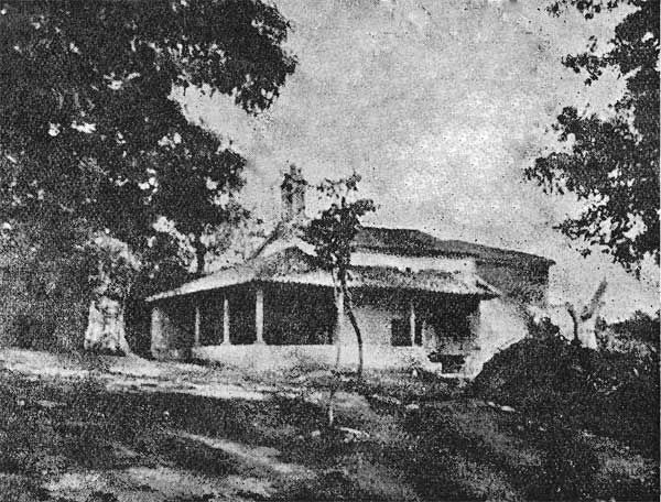 Fotografía de la Capilla de la Soledad o Ecce Homo de Noreña.